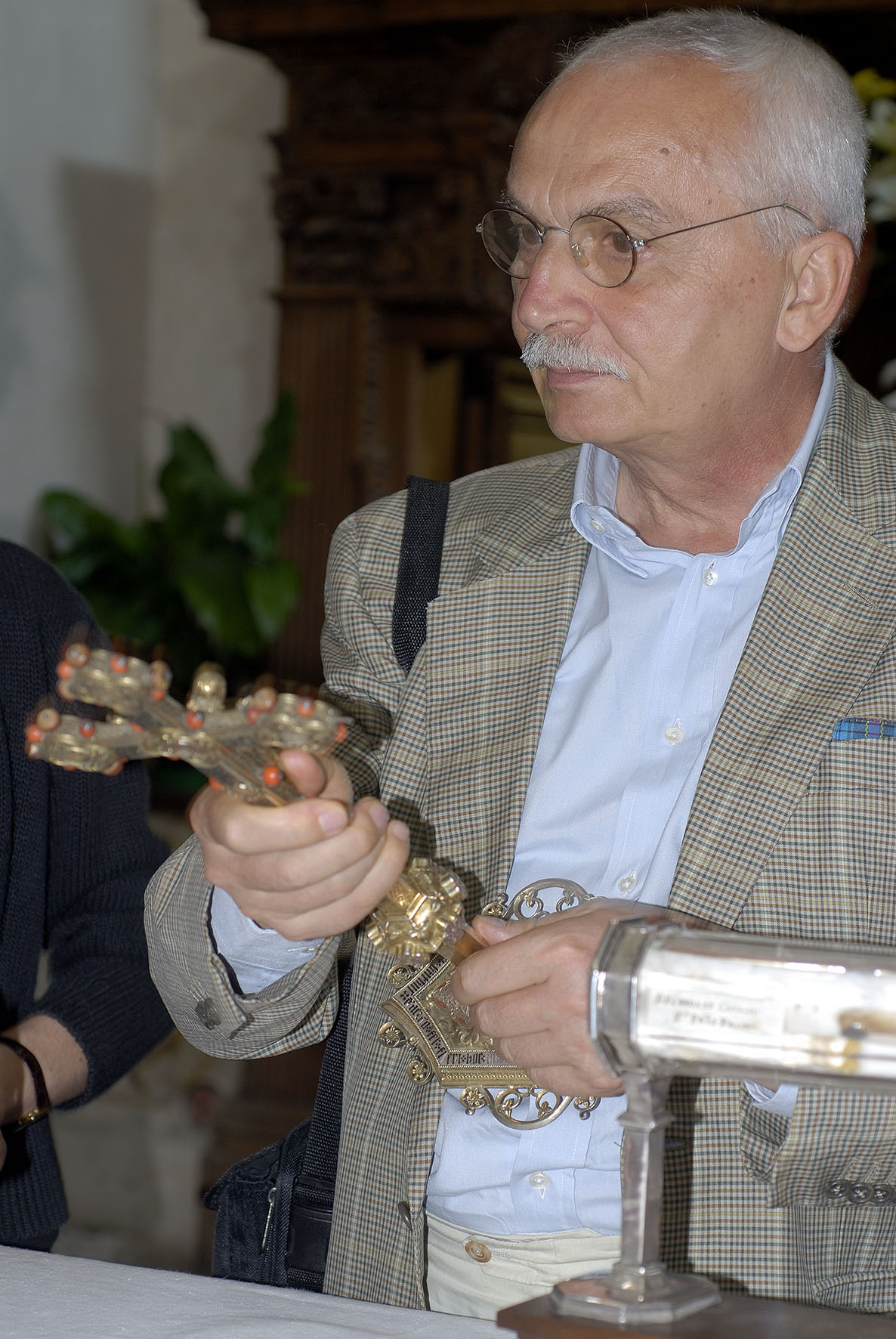 Studioso di storia dell’arte e dell’architettura medievale